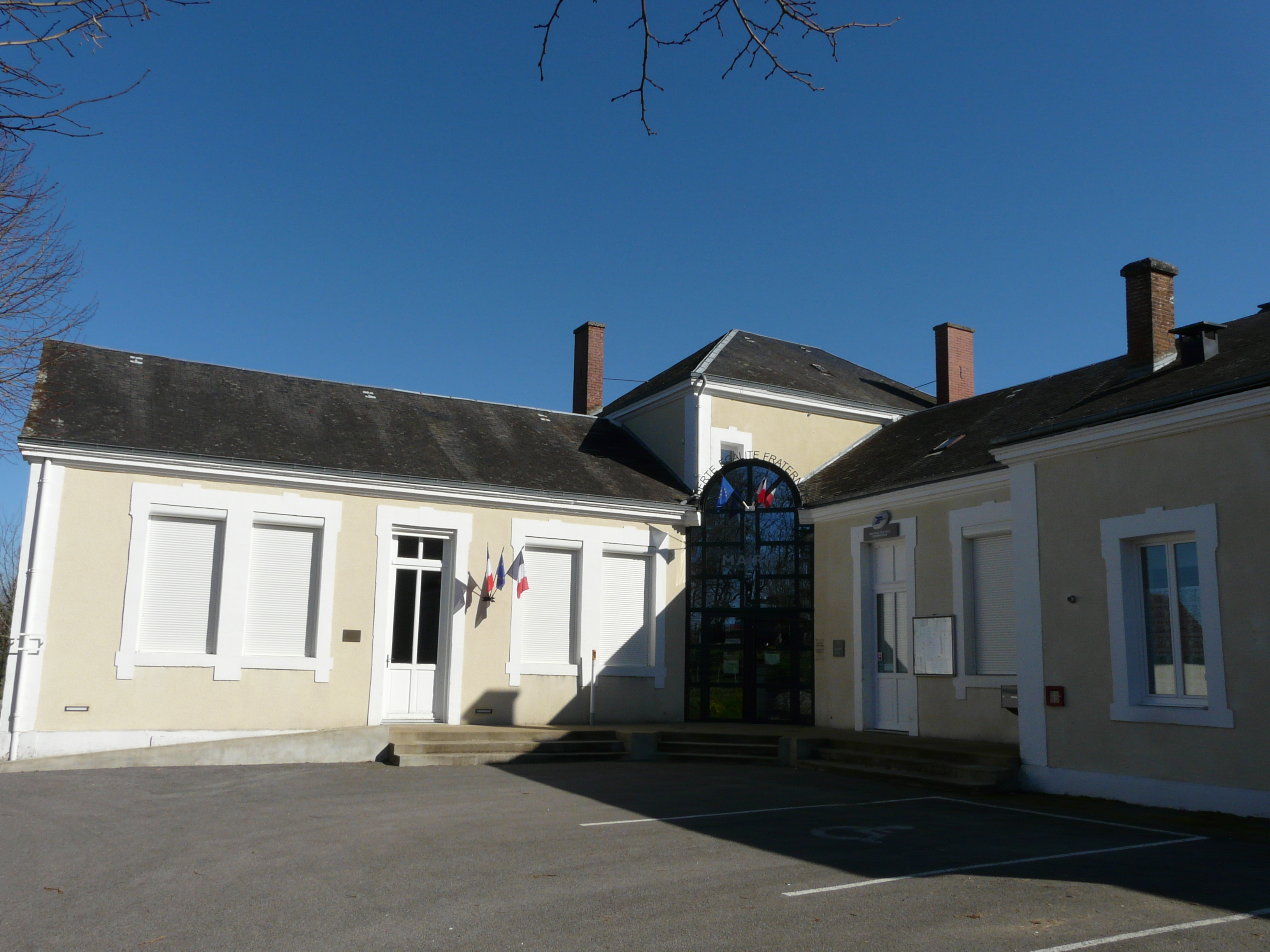 La mairie de Sarlande, Dordogne, France.